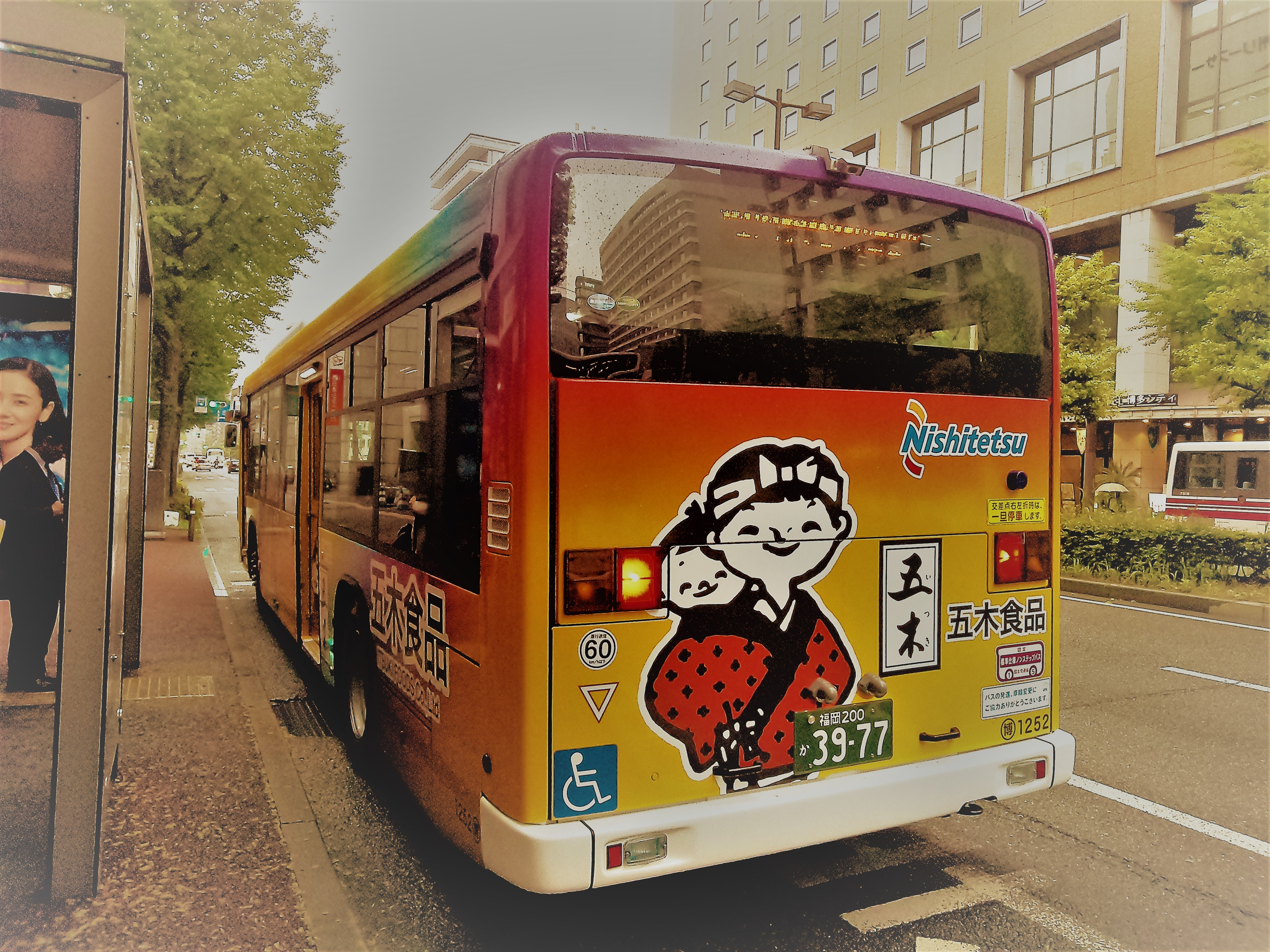 西日本鉄道(株)自動車部門の1252号車、いすゞ2TG-LV290Q2エルガ。福岡市博多区の駅前四丁目BSにて撮影